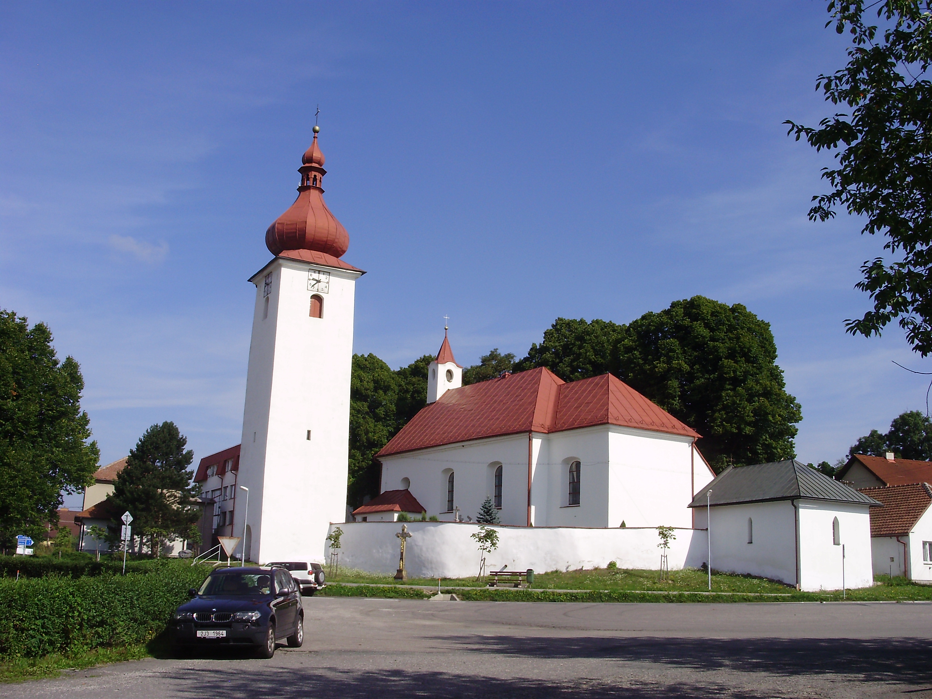 Farní kostel sv. Bartoloměje v Radostíně nad Oslavou